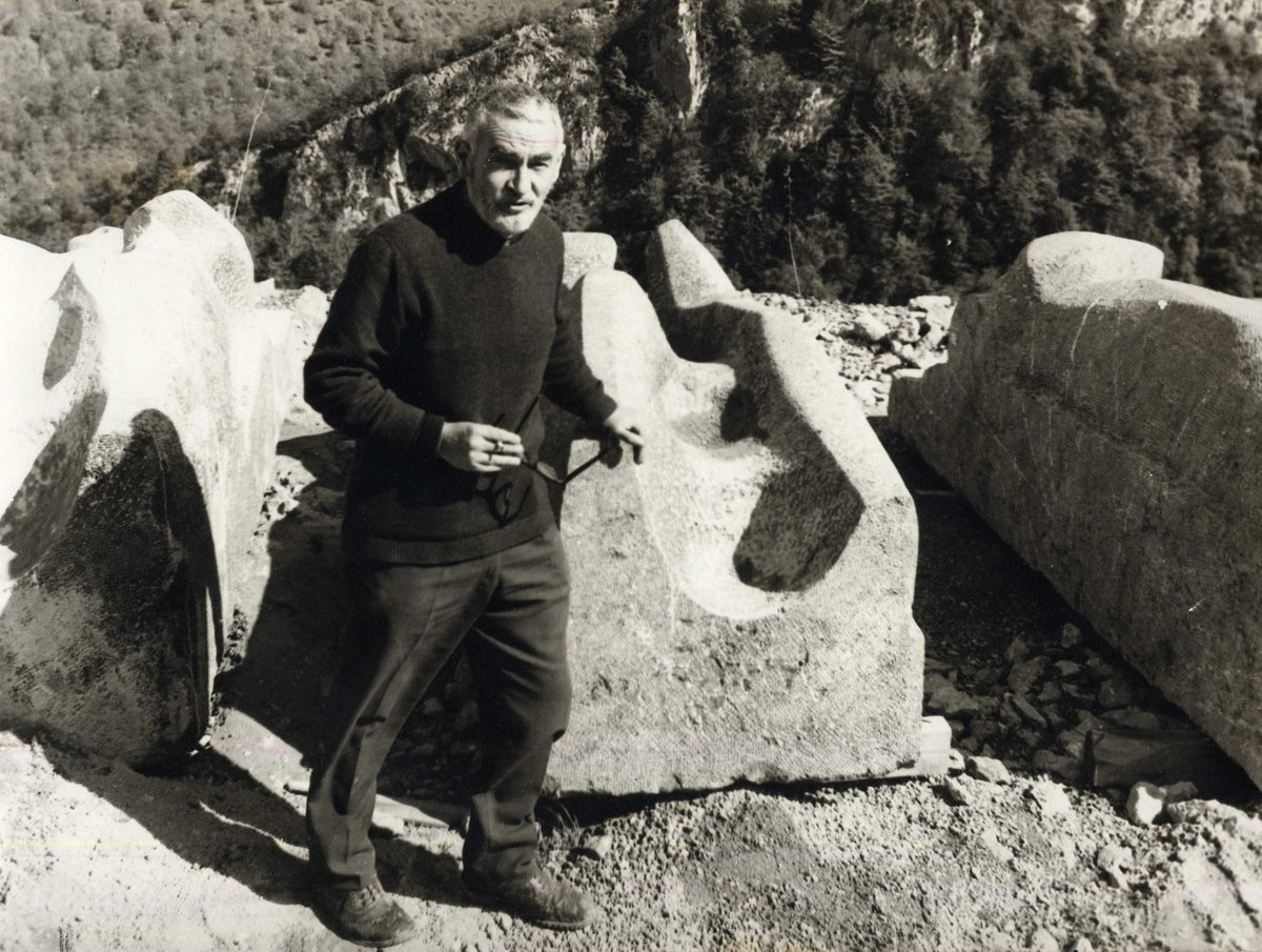 Apostoluen Frisoa - Arantzazu